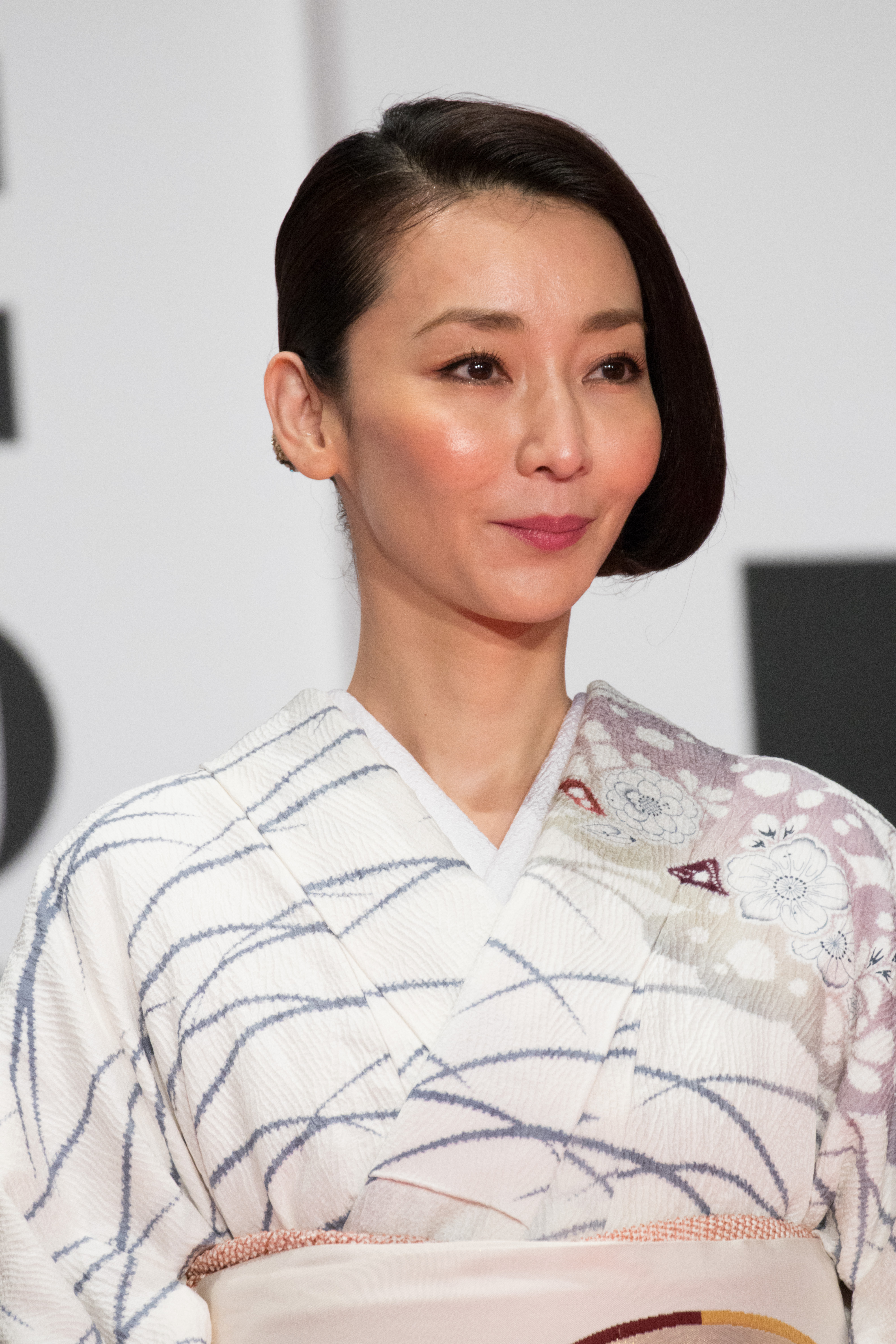 第29回 東京国際映画祭 オープニングセレモニー 稲森いずみ (乱鶯)